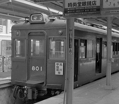 阪急801 1981年頃 夙川駅